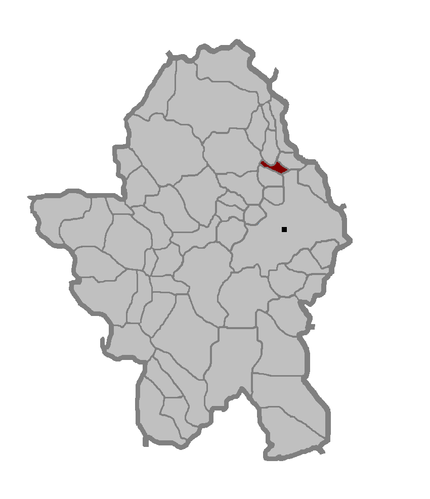 Насељено мјесто Залужани